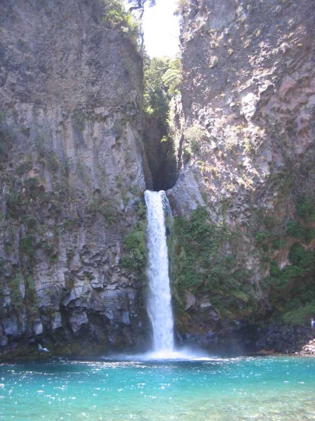 Caída de agua de 25 metros de altura, colindante a las Siete Tazas. Está ubicada en la Reserva Nacional Radal Siete Tazas